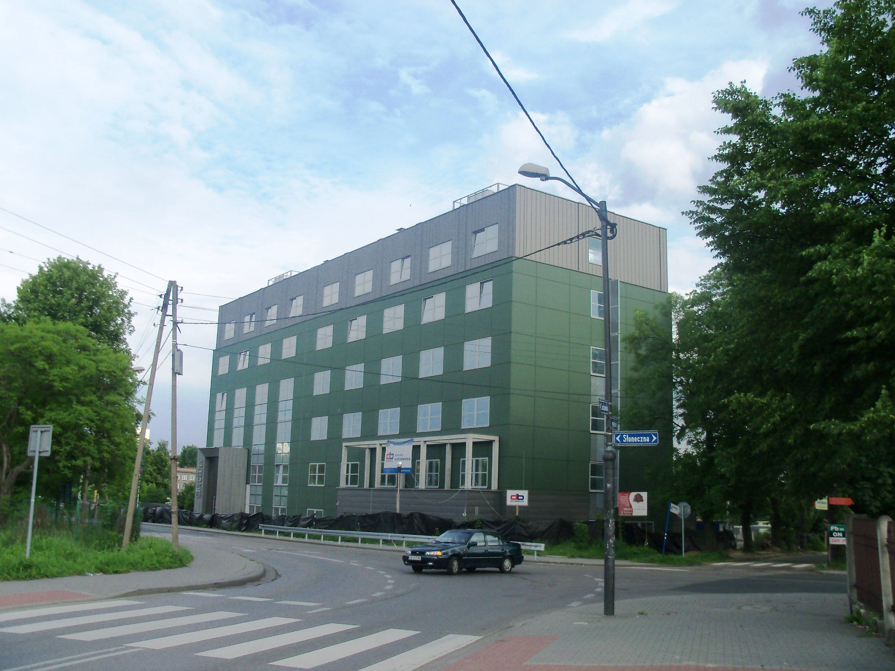 Budynek Izby Celnej przy ul. Słonecznej w Katowicach